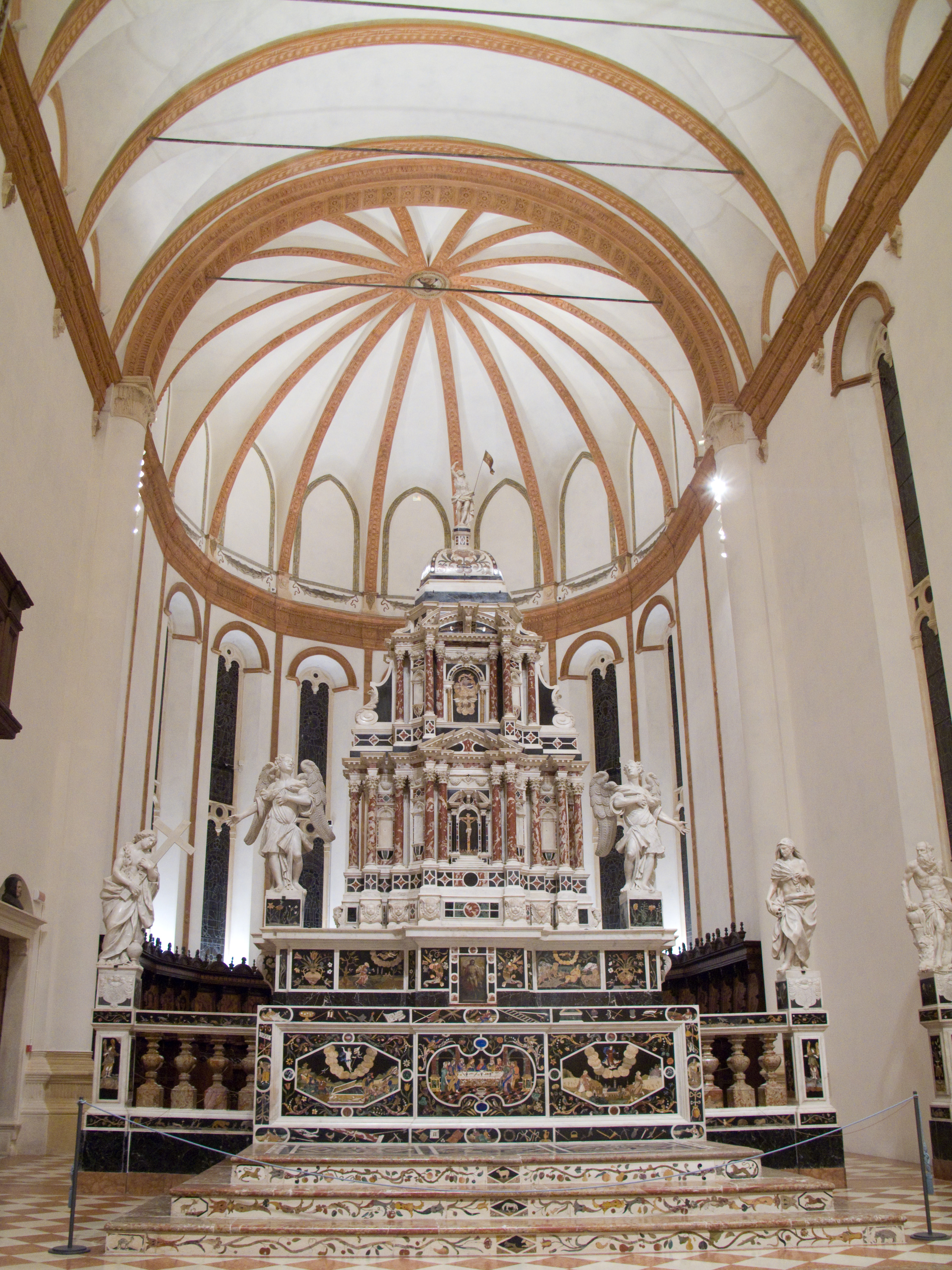 Vicenza - Chiesa di Santa Corona - Altare centrale